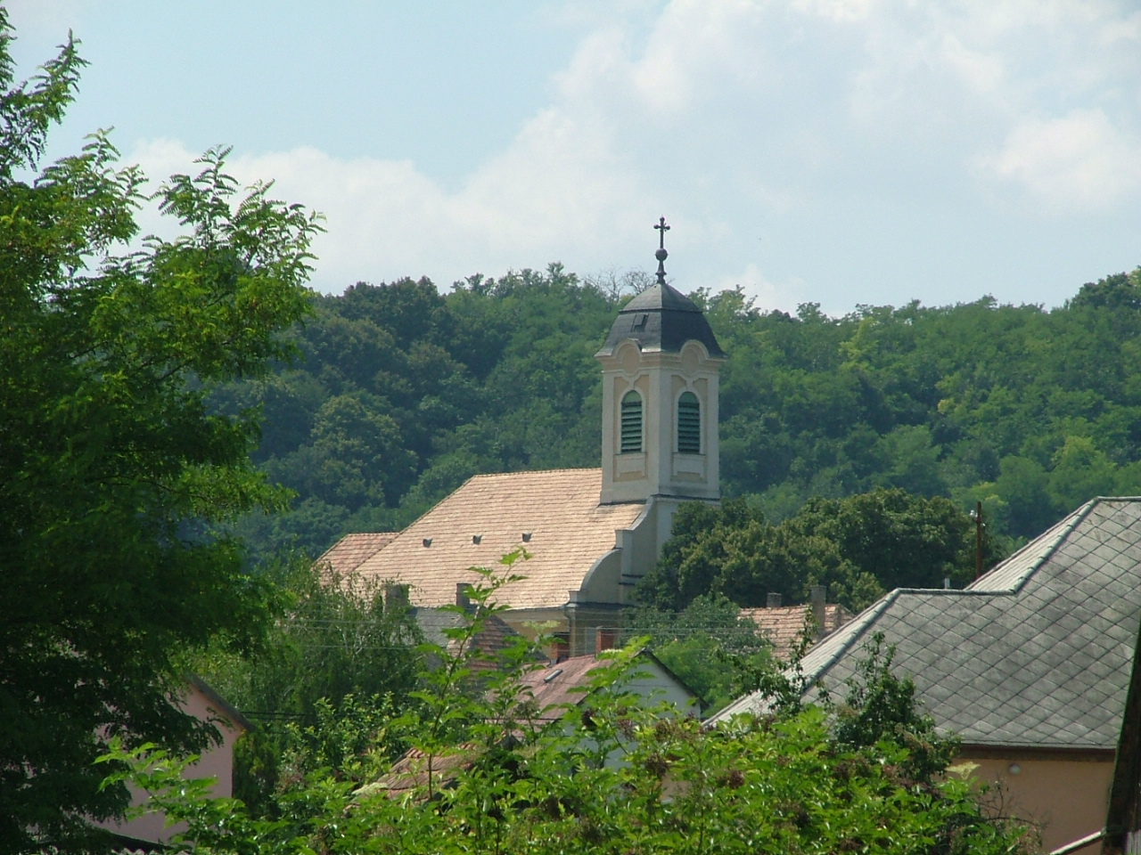 Ravazdi római katolikus templom